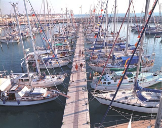 מרינה אשקלון.